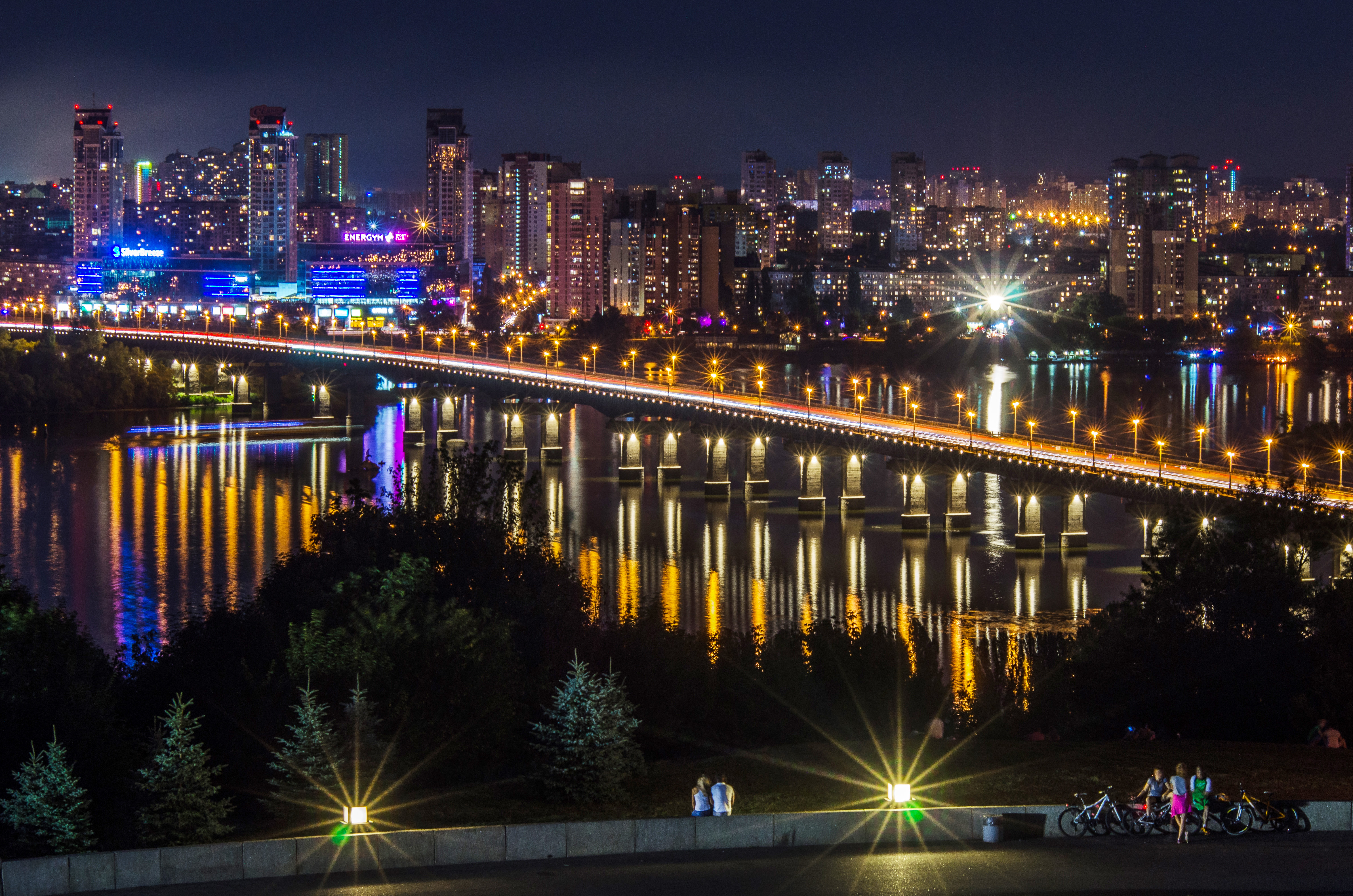 Міст ім. Є. О. Патона, Київ, Набережна Дніпра